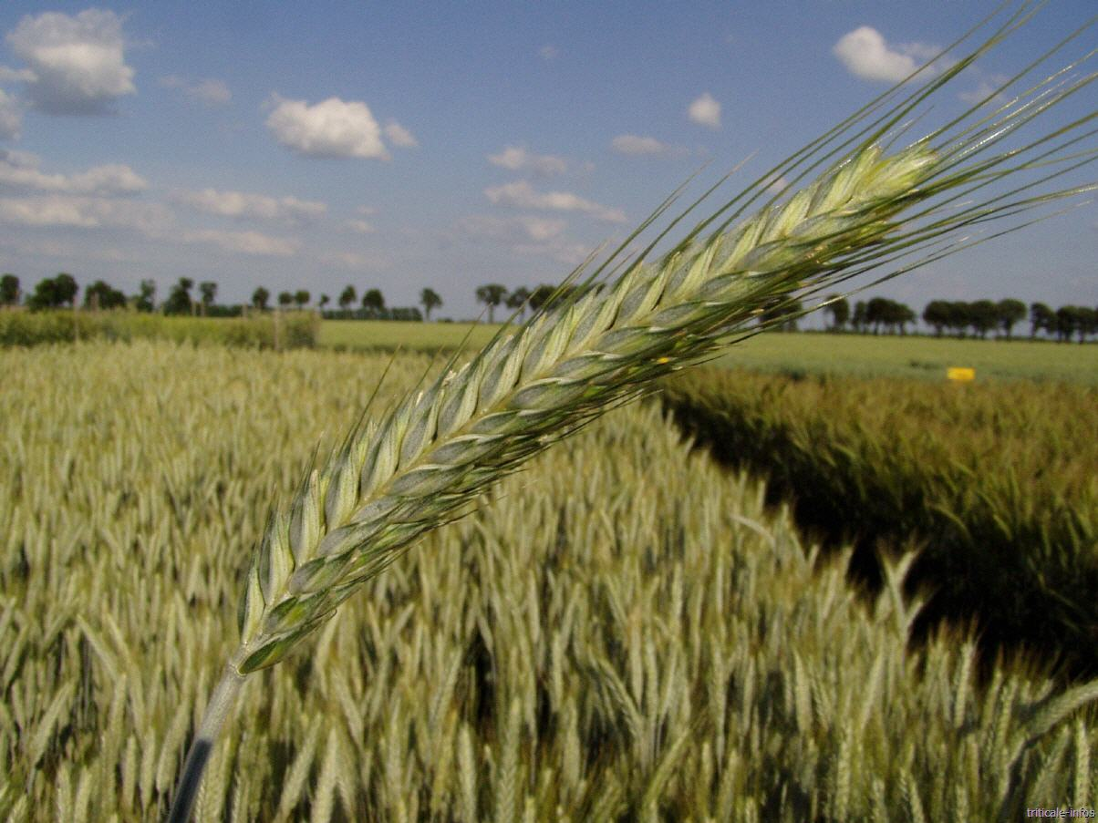 épi de triticale